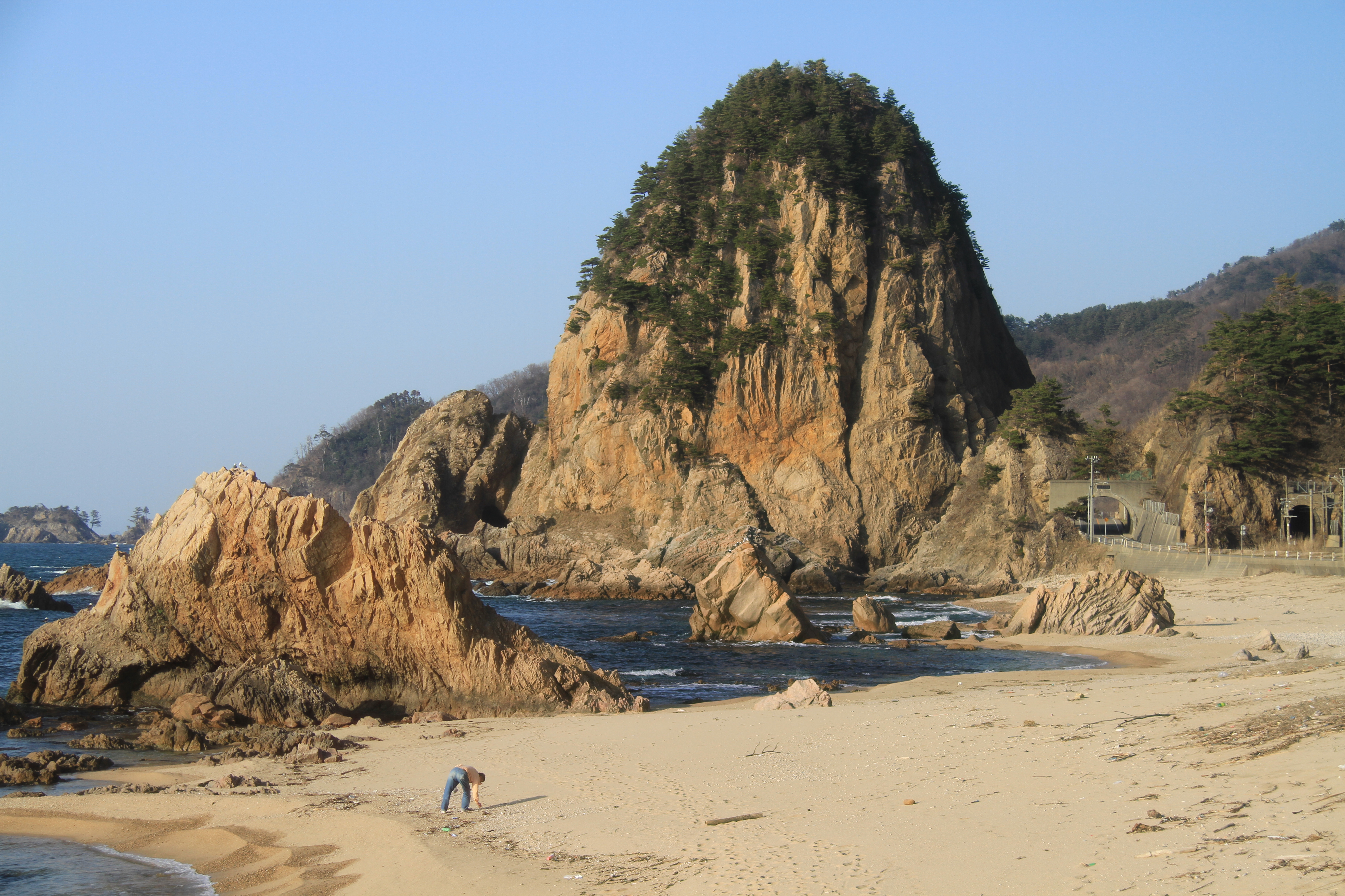 Imagawa, Murakami, Niigata Prefecture 959-3662, Japan